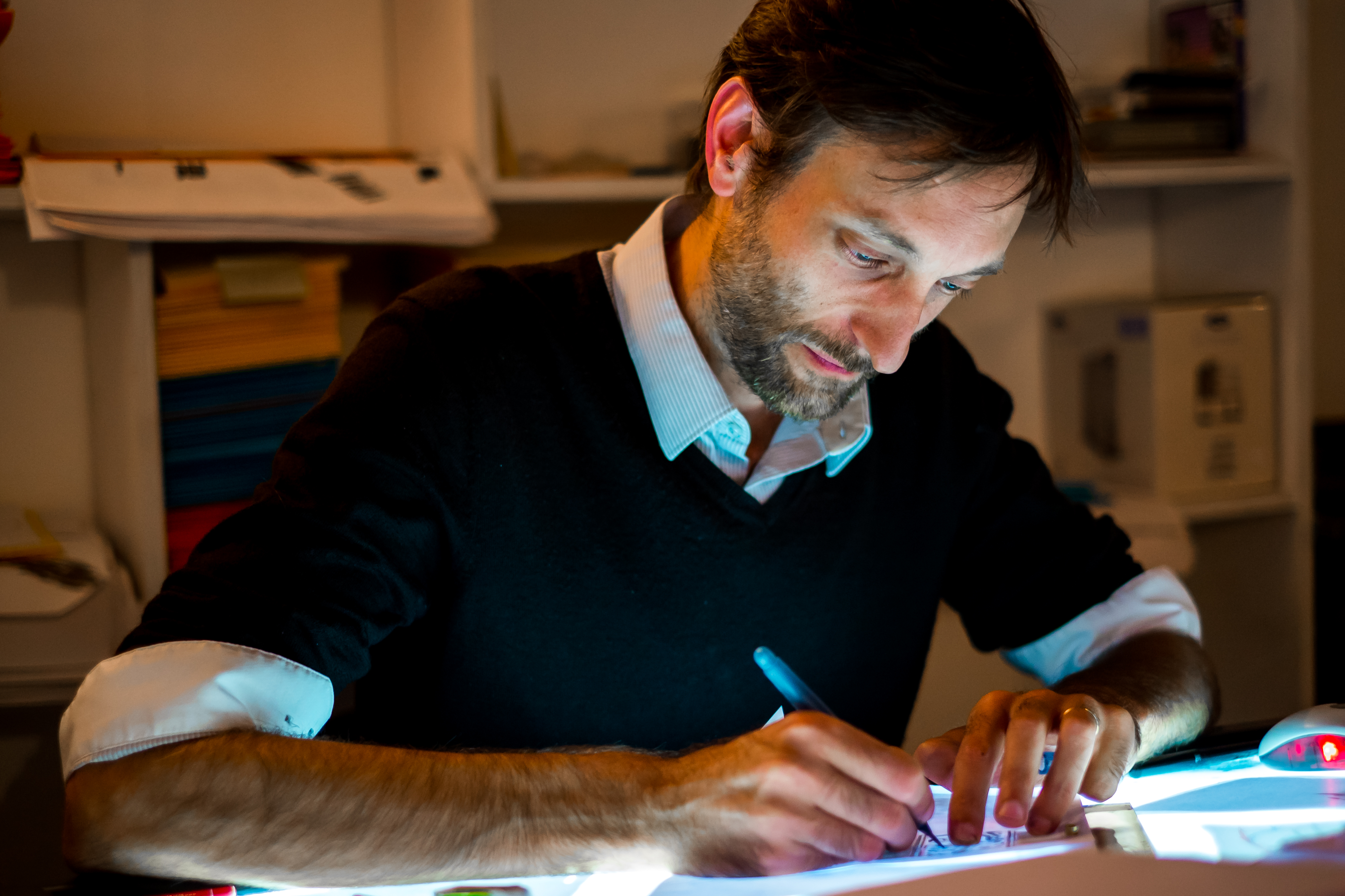 Réalisateur de films d'animation au travail.